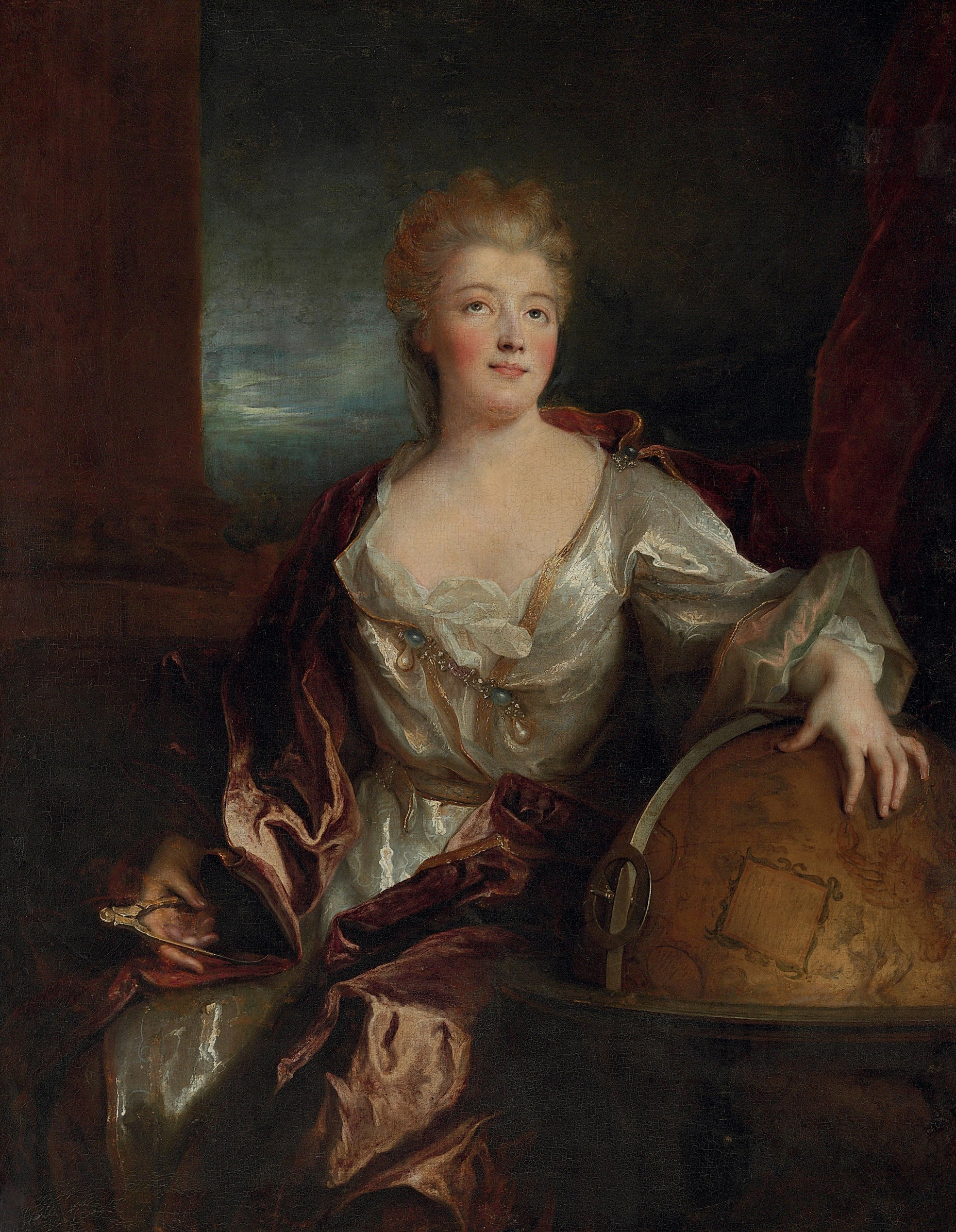 Portrait d'une dame